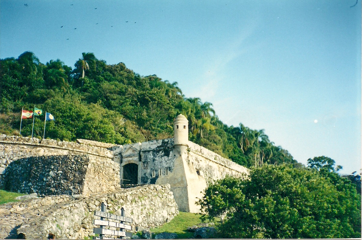 Fortaleza de Santo Antônio de Ratones, ilha de Ratones Grande, SC, Brasil: aspecto do Portão de Armas.